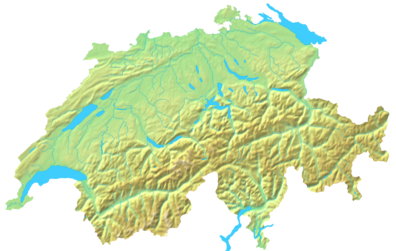 Blanc topographic Map of Switzerland / Relief-Karte der Schweiz (blanko)